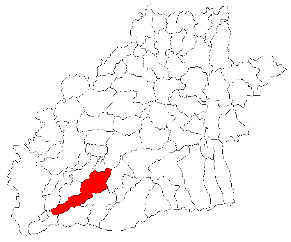 Categorie:Hărţi ale judeţului Sibiu